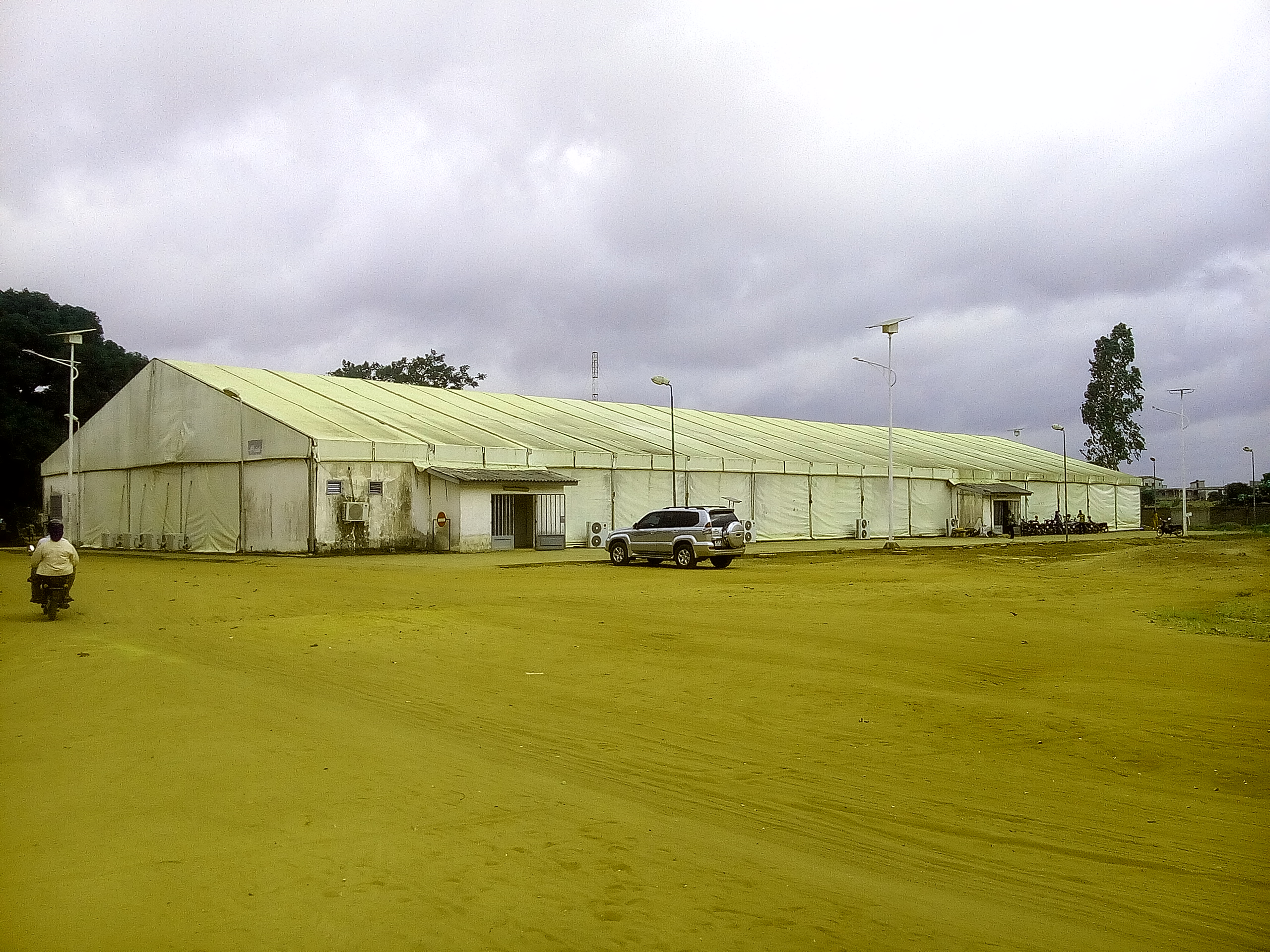 amphi Idriss Deby uac